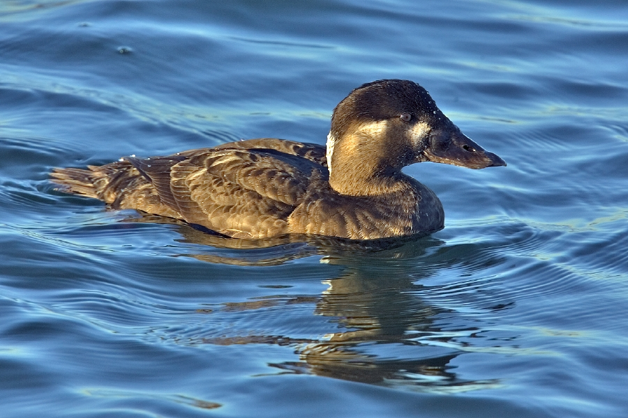 Melanitta perspicillata - Surf Scoter (Female), Bolsa Chica Ecological Reserve, Huntington Beach, California